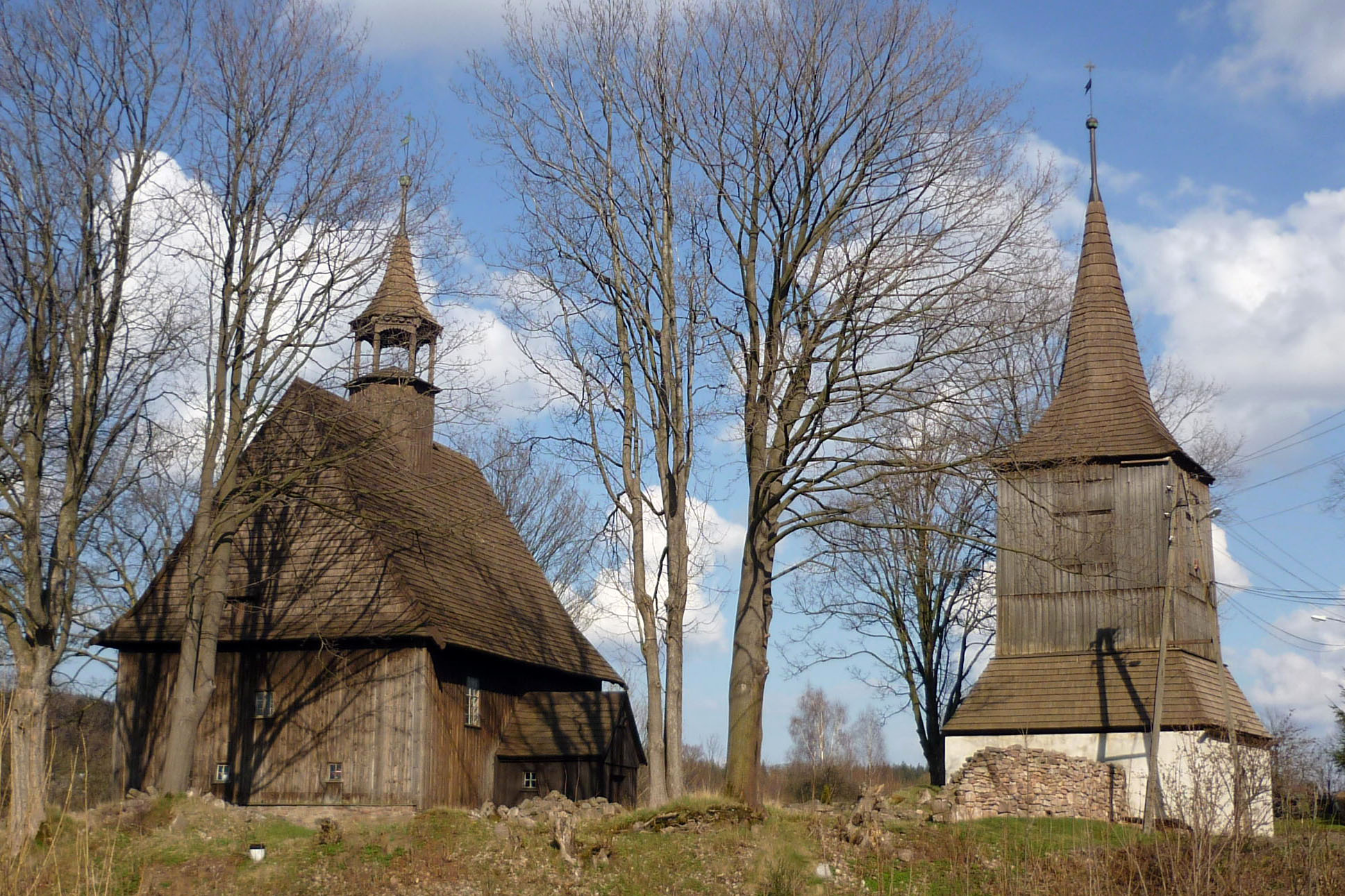 Rybnica Leśna, Woiwodschaft Niederschlesien (Reimswaldau) - Holzkirche St. Hedwig